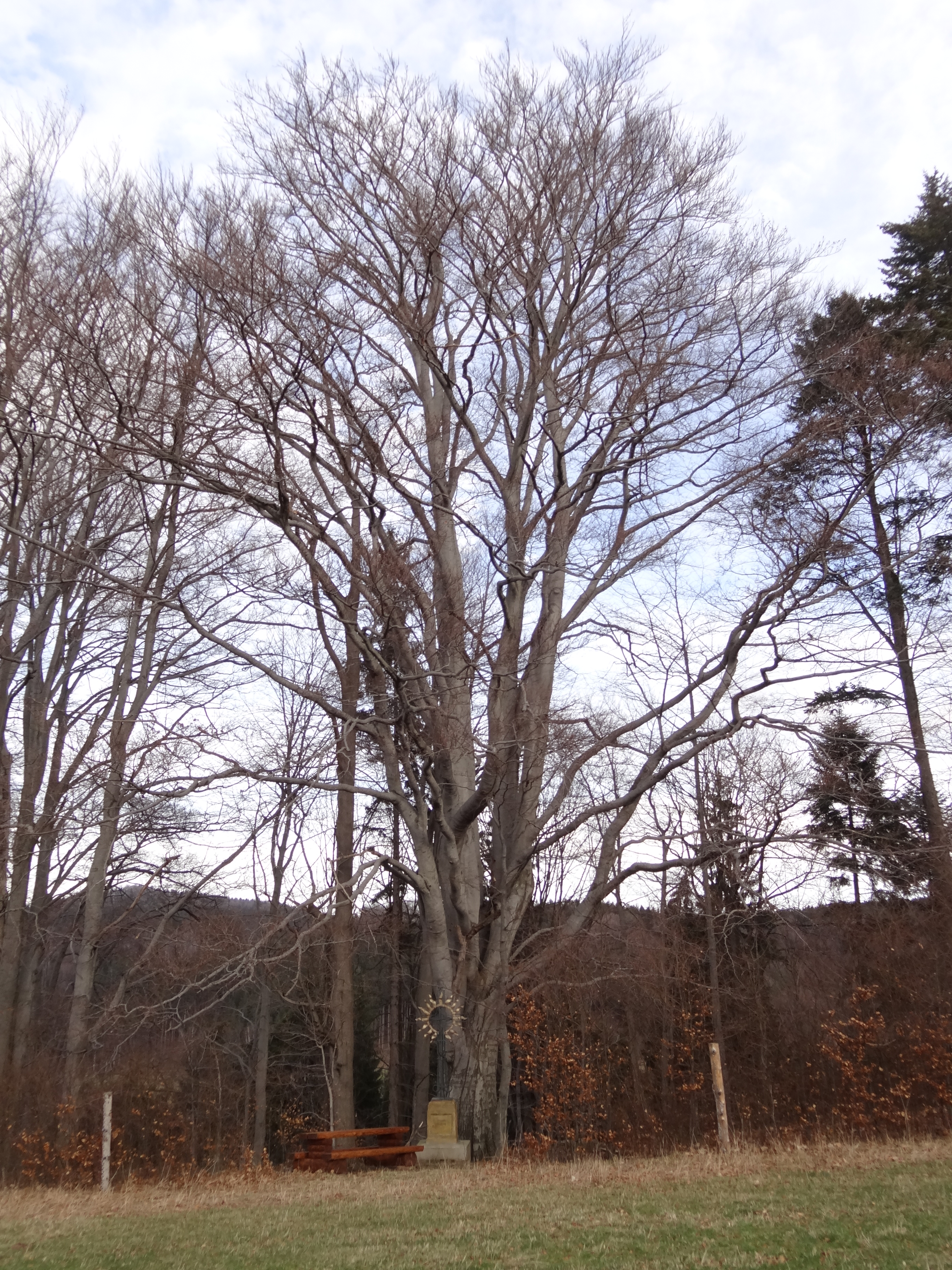 Raspenava - památný Sluneční buk na úpatí Pekelského vrchu